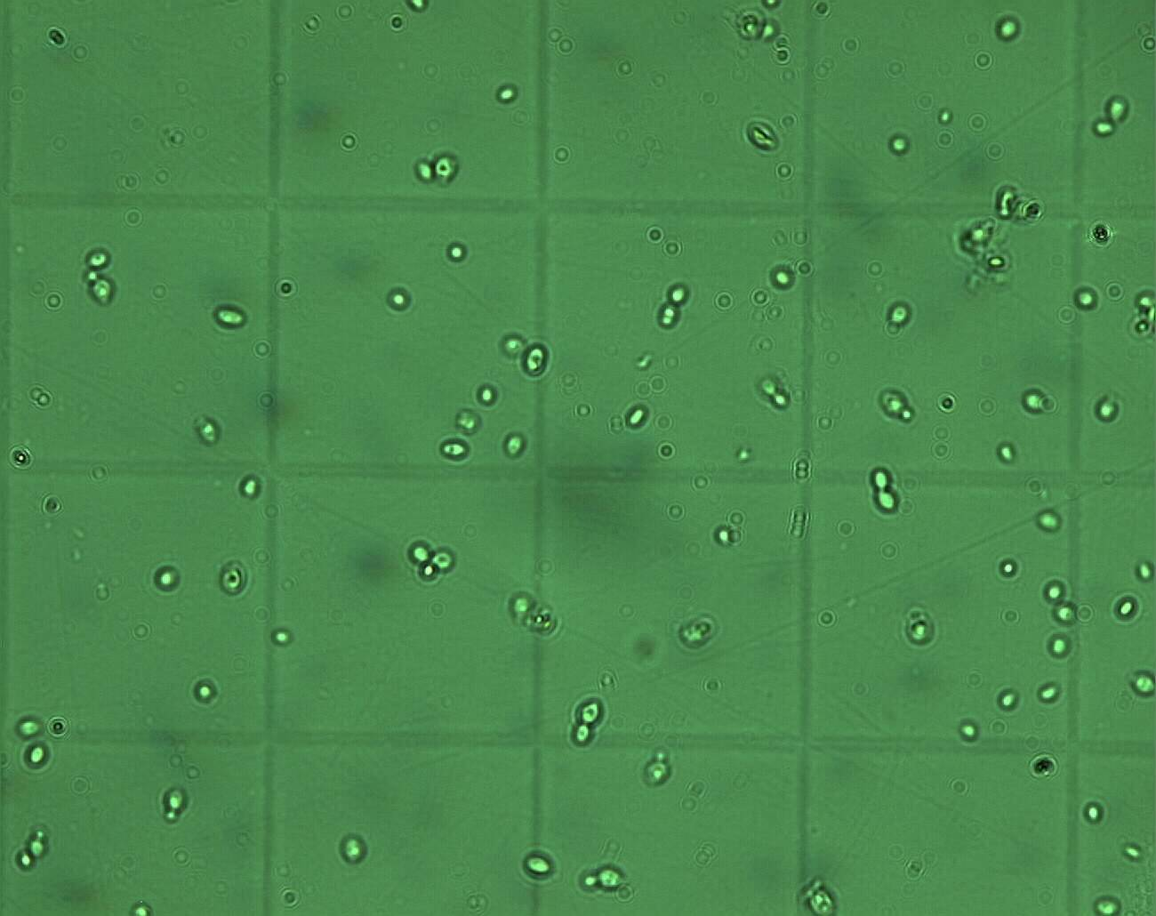 Préparation d'une cellule de Thoma de Bretanomyces bruxellensis (grossissement X400). Ce type de levure est reconnaissable à la cicatrice prononcée laissée lors de la division cellulaire par bourgeonnement.